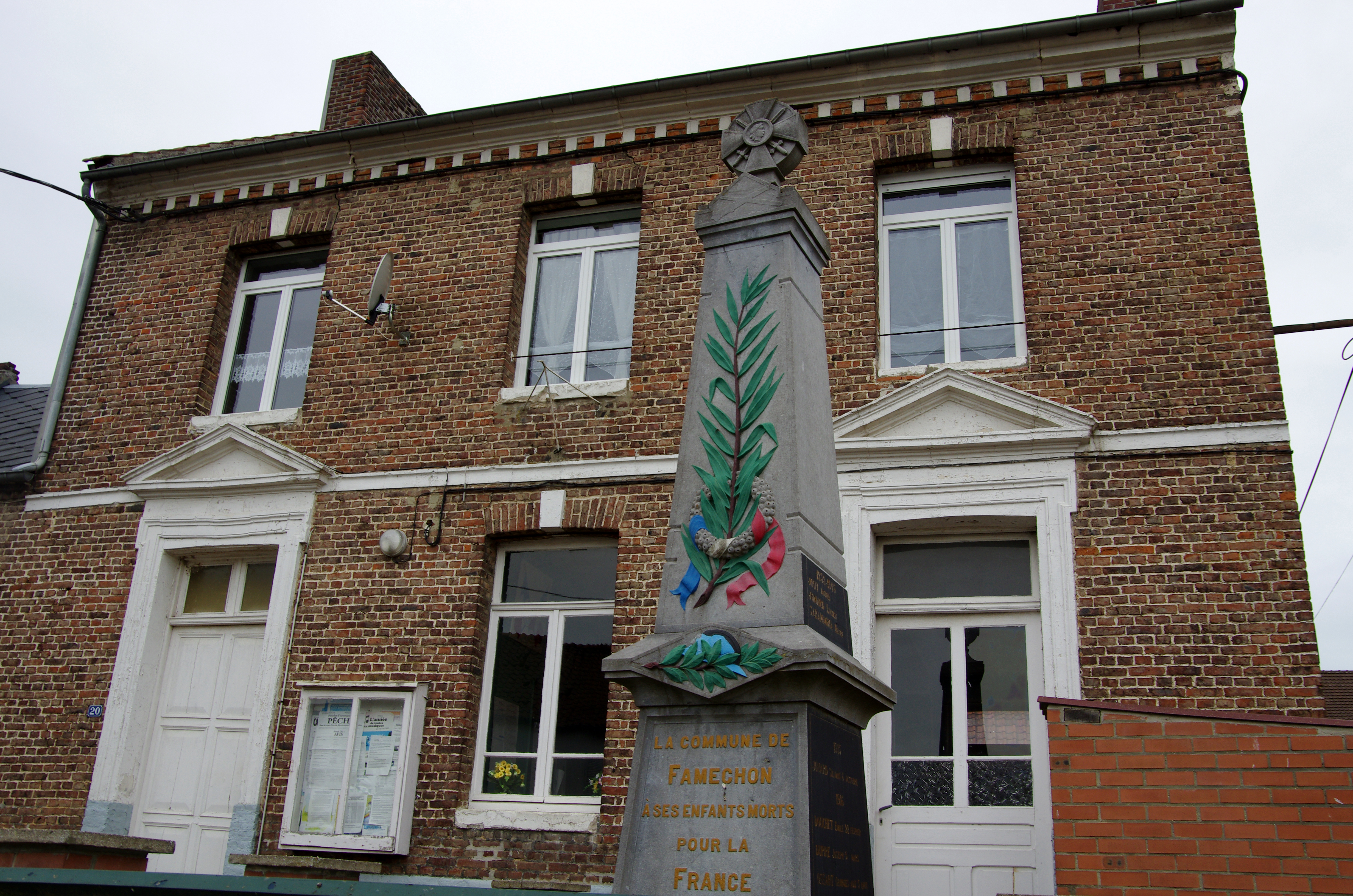 Famechon (Pas-de-Calais, France) - La mairie et le monument-aux-morts. .